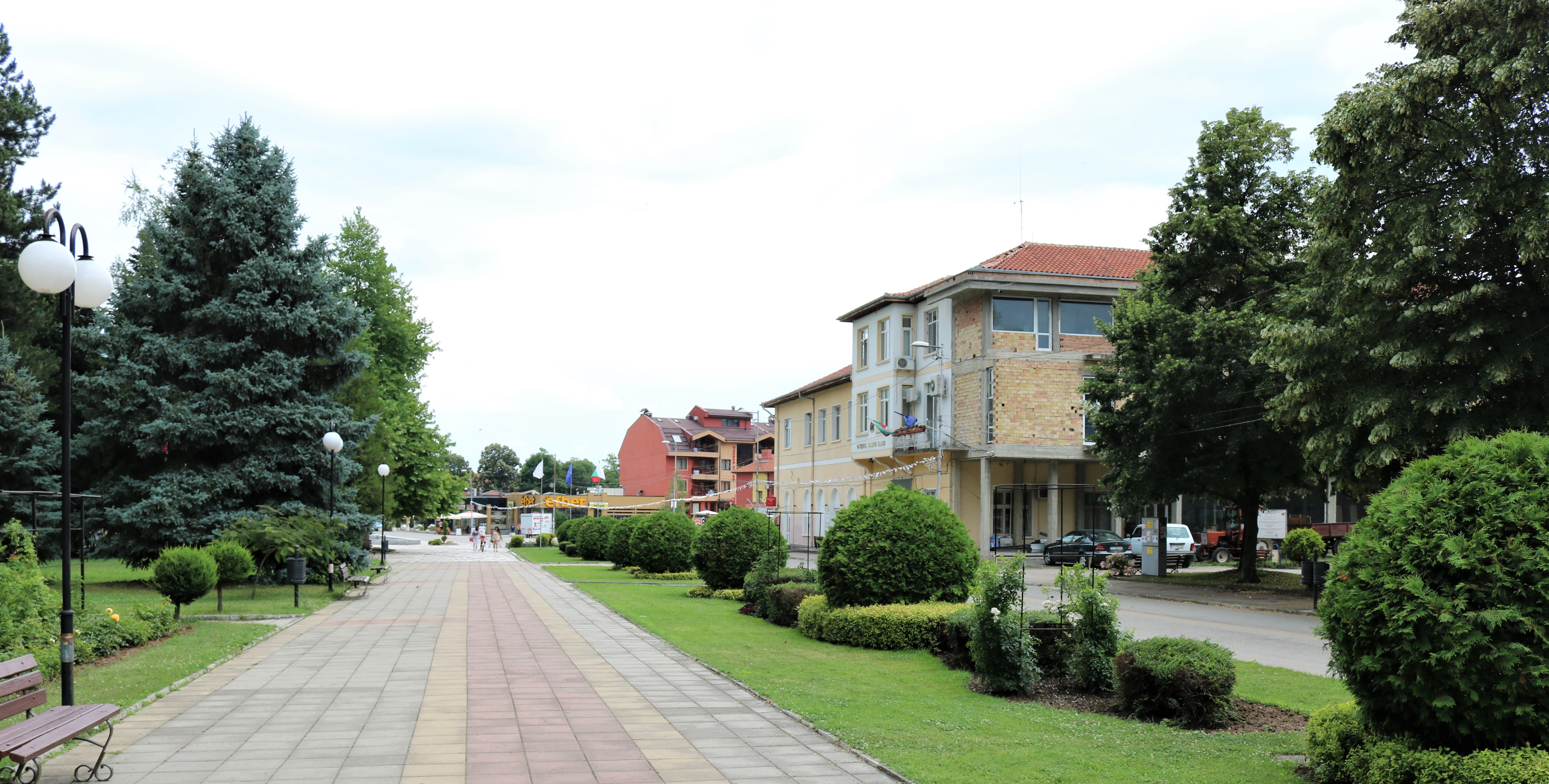 Павел баня